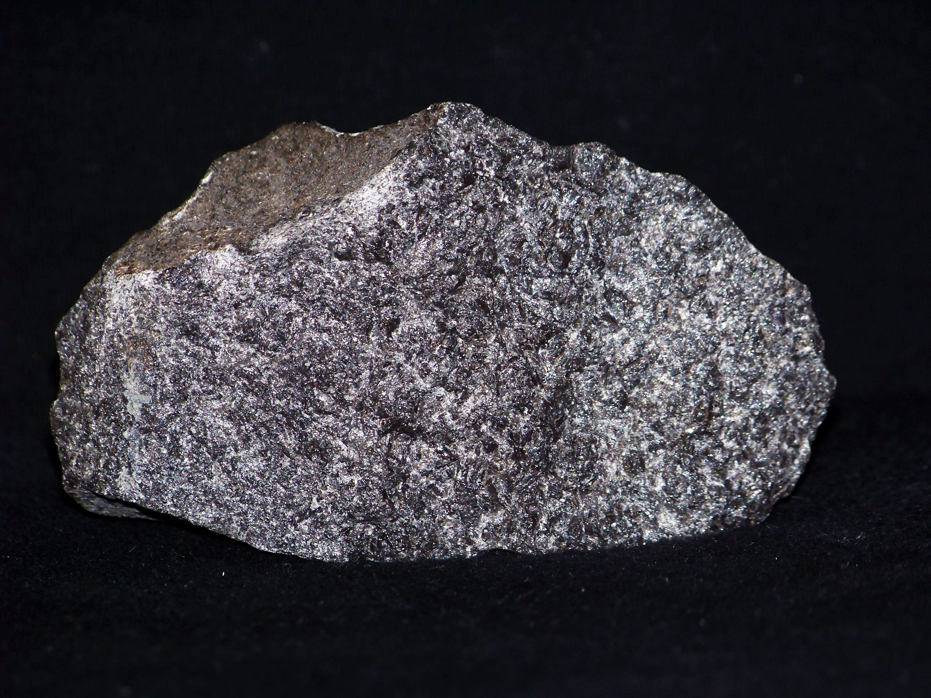 Najprawdopodobniej dioryt, skała z grupy diorytoidów i gabroidów